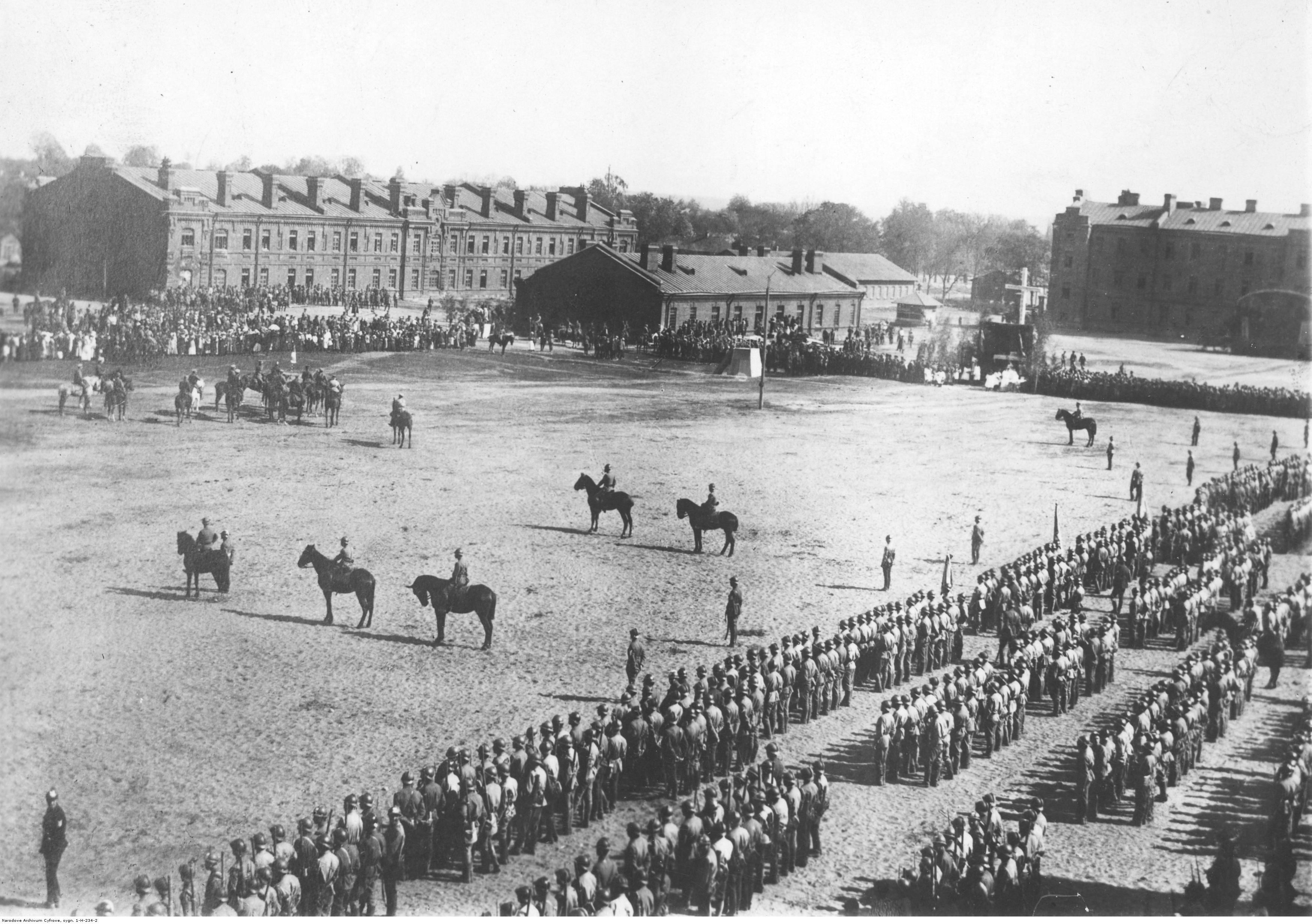 I Korpus Polski w Rosji - uroczystość Święta 3 Maja - parada; Bobrujsk 1918 r. Koncern Ilustrowany Kurier Codzienny - Archiwum Ilustracji. Sygnatura: 1-H-234-2